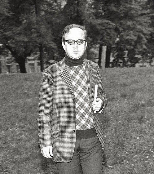 Vanni Scheiwiller